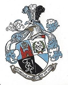 Wappen des Corps Rubonia zu Riga: Der Wappenschild zeigt im heraldisch rechten Oberfeld Rigas Stadtwappen, links zwei gekreuzte, von einem Eichenkranz umwundene Hieber mit Datum und Jahreszahl der Stiftung, im rechten Unterfeld den Corpszirkel, links die Corpsfarben. Die Helmzier besteht aus drei Straußenfedern in den Farben hellblau, weiß und schwarz. Die Wappendecke ist hellblau-weiß. Unter dem Schild befindet sich das Wappenband mit dem Wahlspruch „Mit Wort und Tat für Ehr’ und Recht!“.